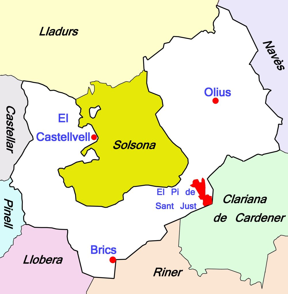 Mapa del municipi d'Olius (Solsonès) amb les seves entitats de població i els municipis limítrofes.